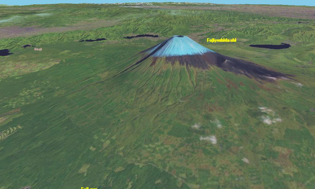 World Wind Screenshot